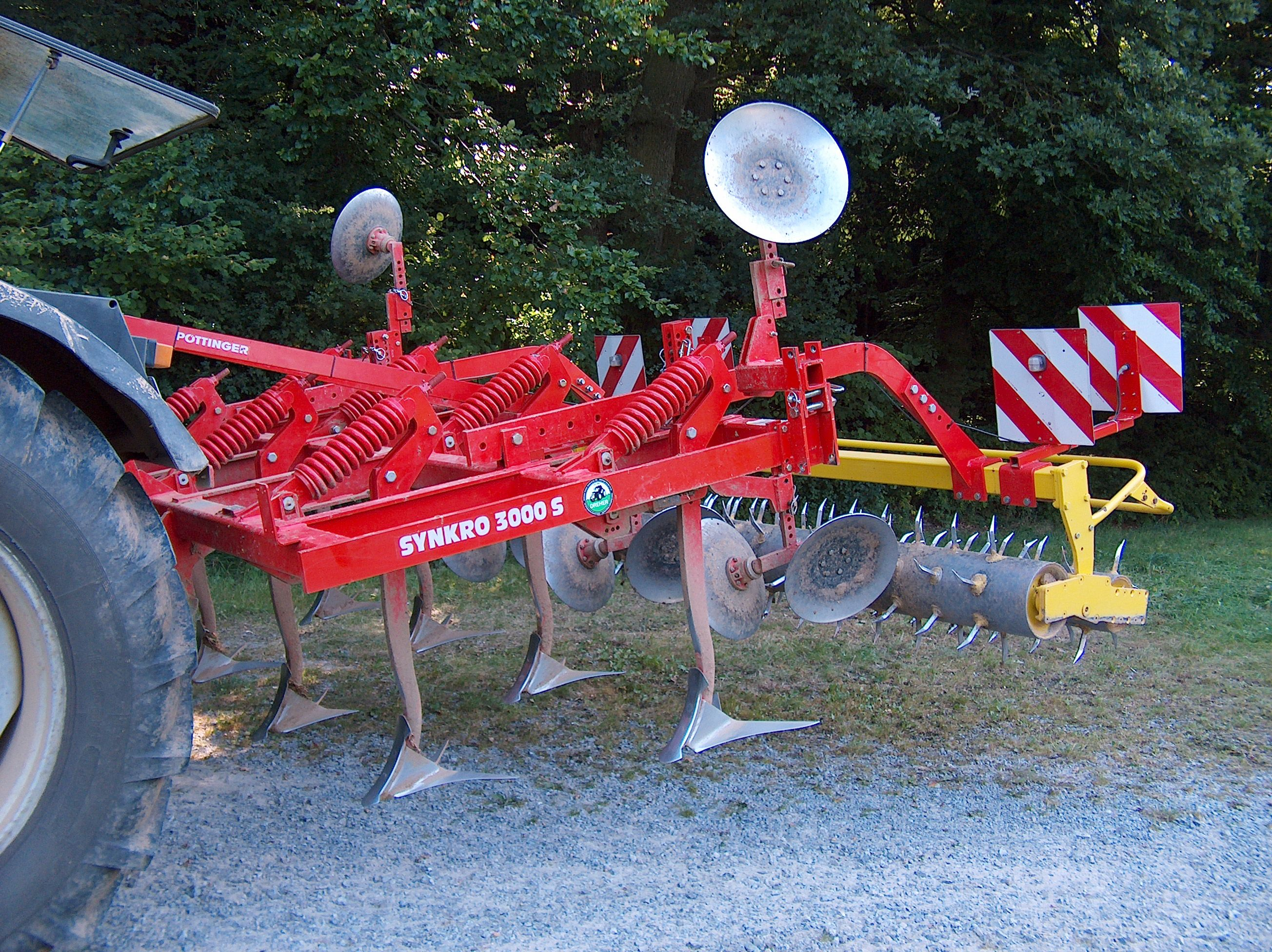 Grubber Pöttinger Synkro 3000 S